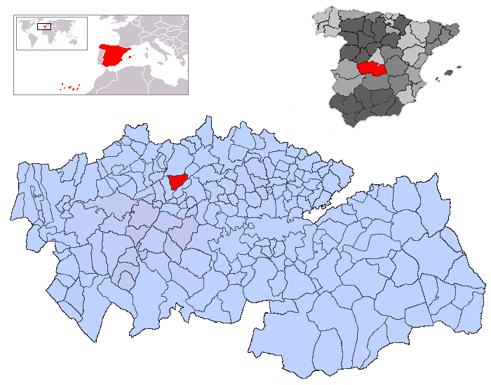 El Casar de Escalona en la provincia de Toledo